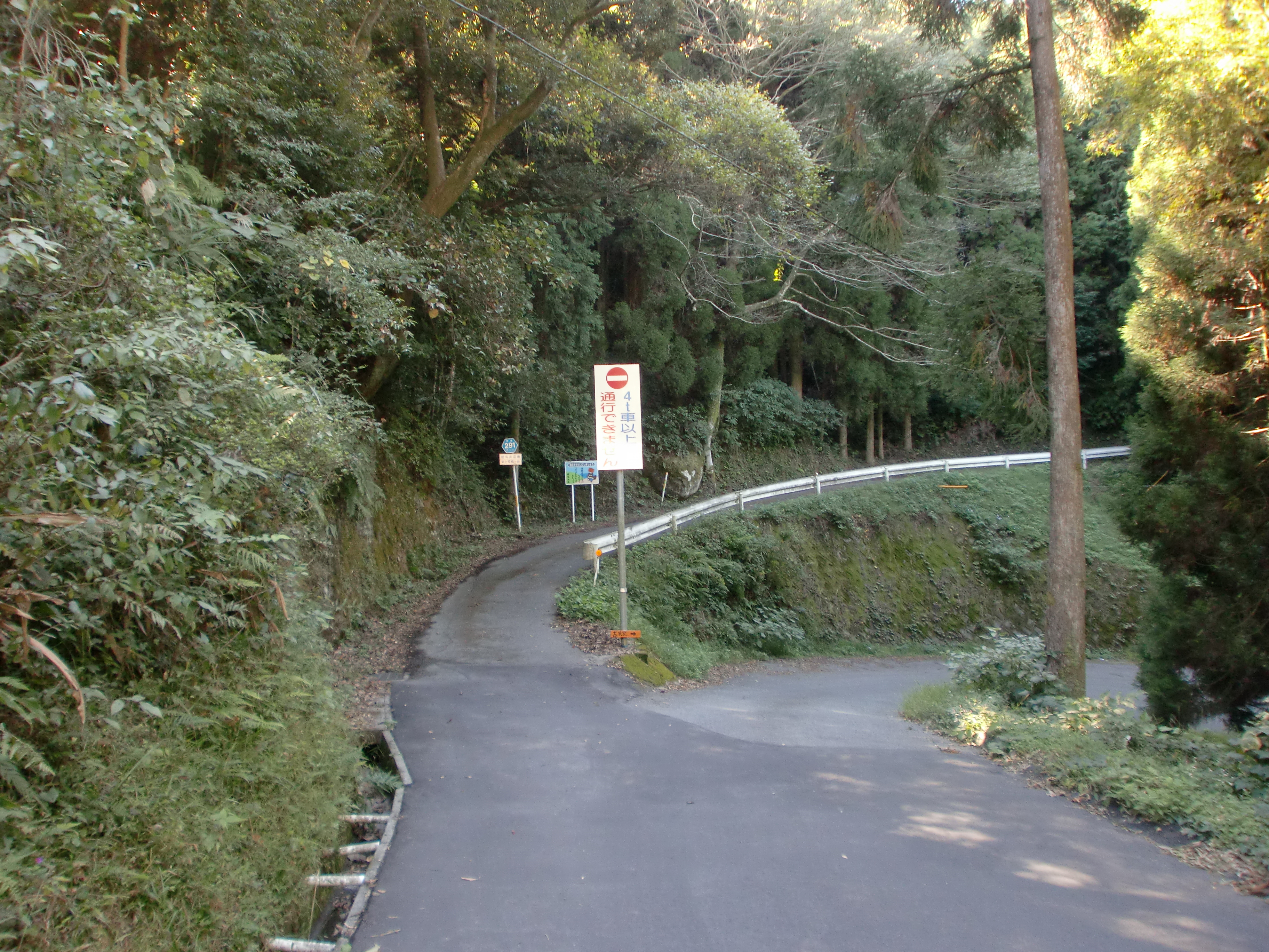 鹿児島県道291号松元川辺線を伊作峠から川辺方面を望む（左方向の道が県道291、右方向の道は日置市道である）